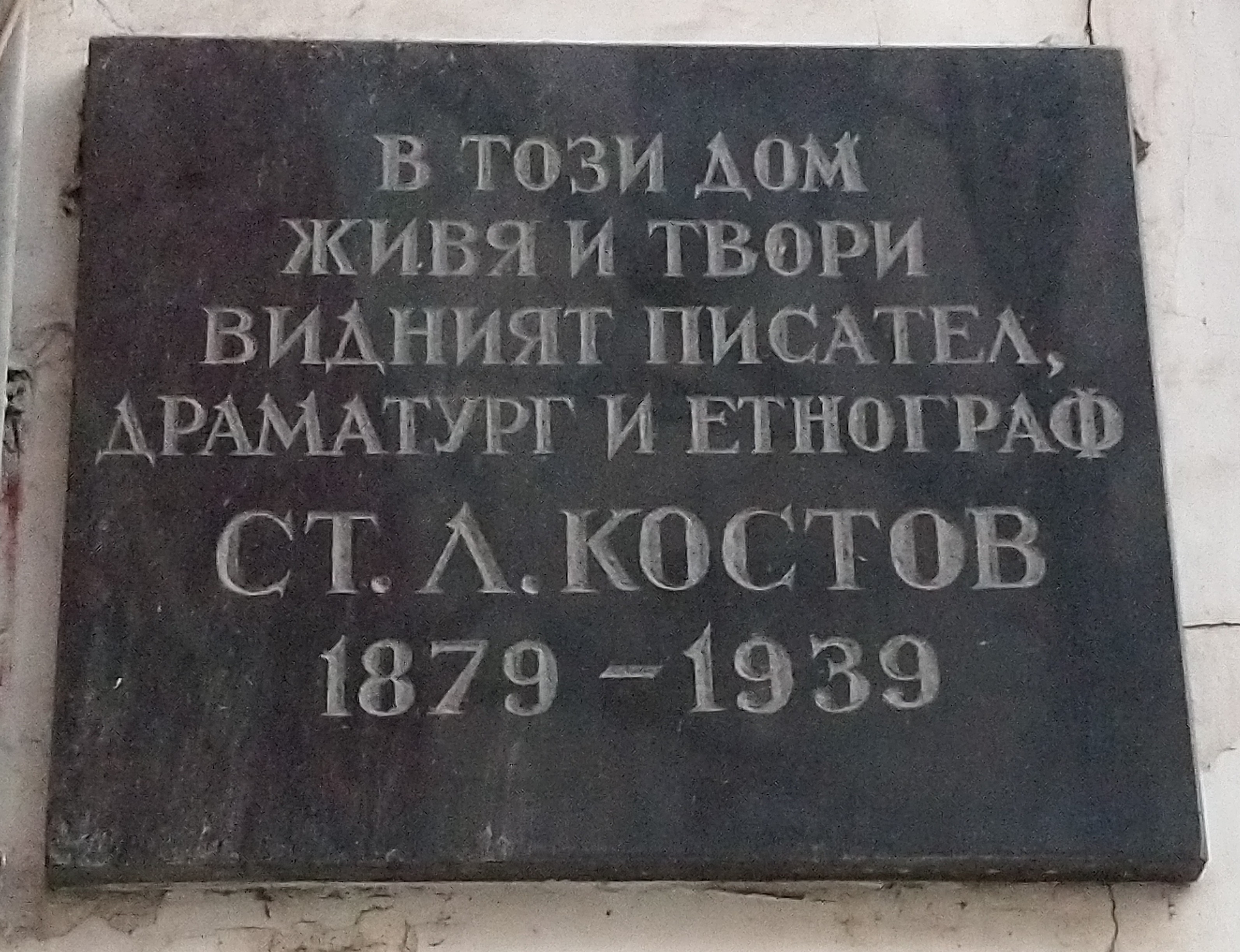 Паметна плоча на писателя Ст. Л. Костов, ул. Г. С. Раковски 149, София